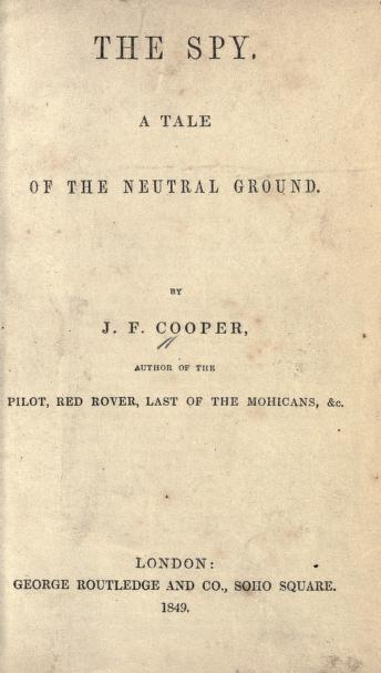 Cover of 1849 British edition of "The Spy: a Tale of the Neutral Ground"